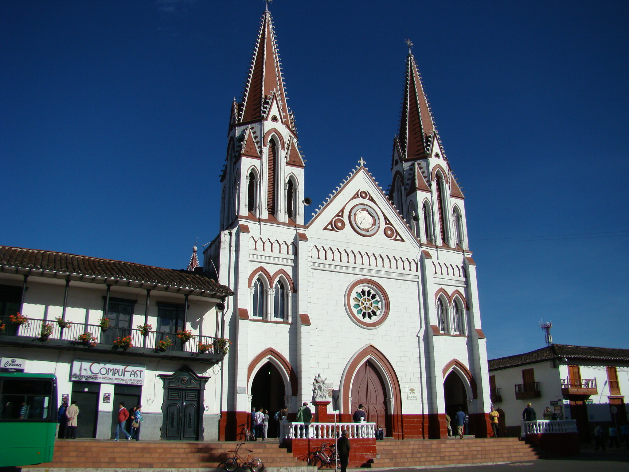 Basílica Menor de Nuestra Señora del Carmen en el municipio de La Ceja, Antioquia, Colombia.